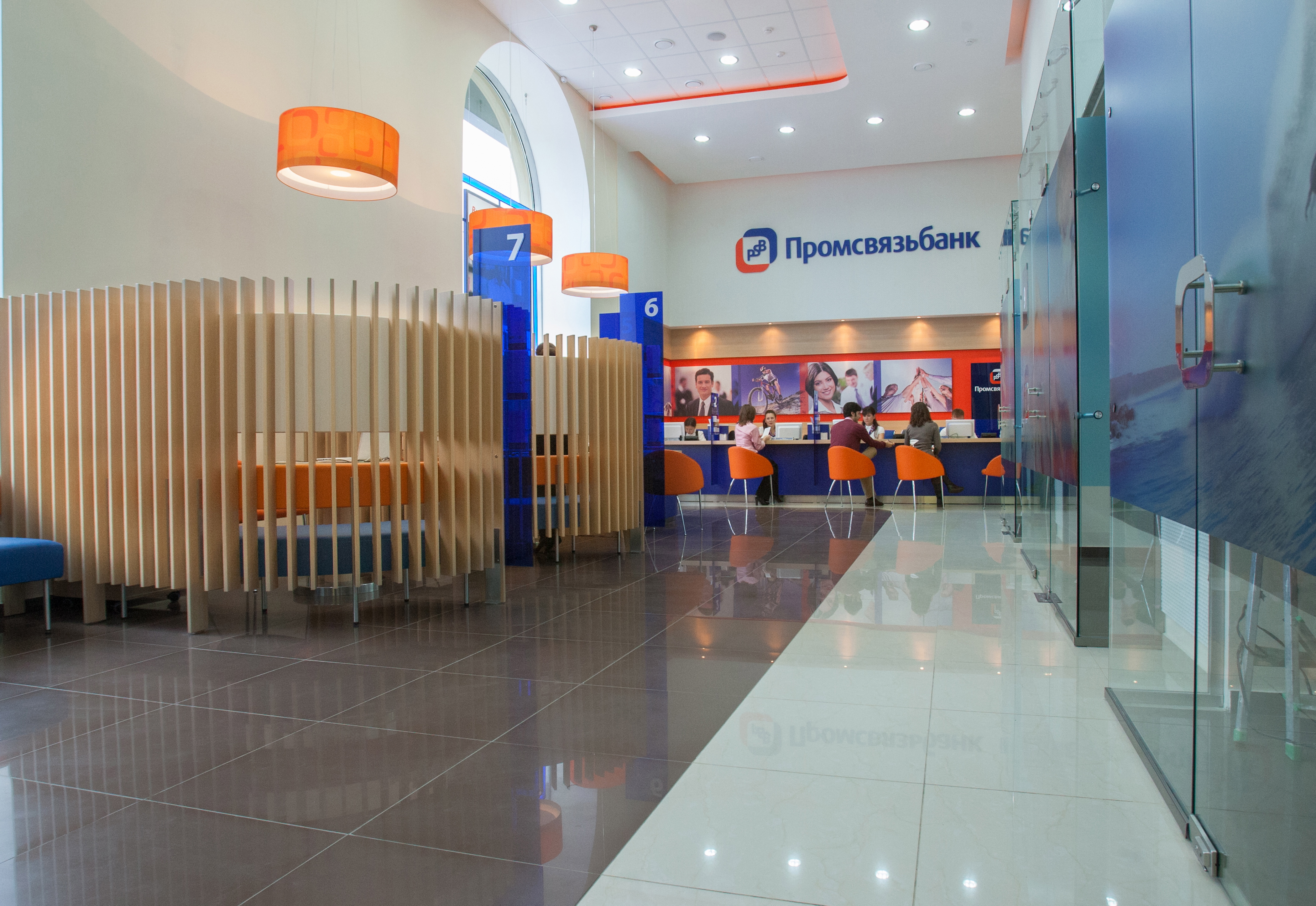 Один из офисов Промсвязьбанка в Москве